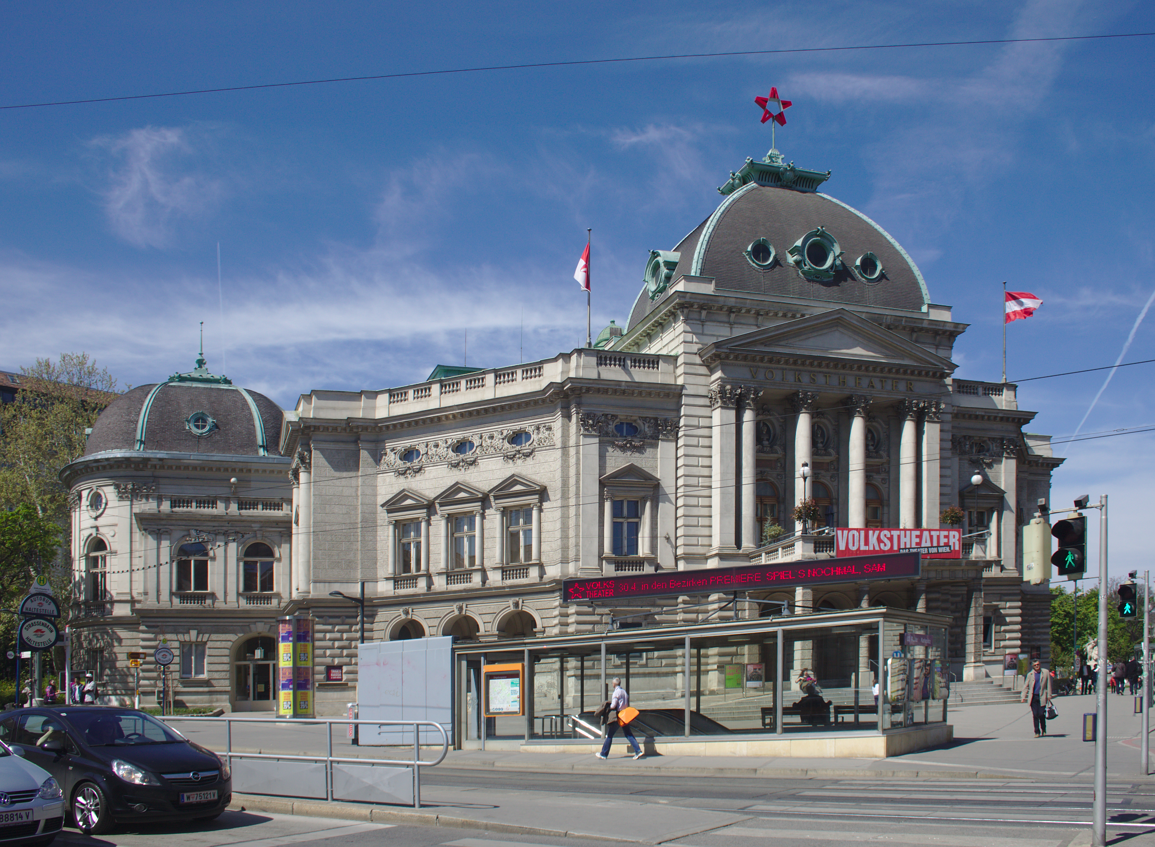 Volkstheater